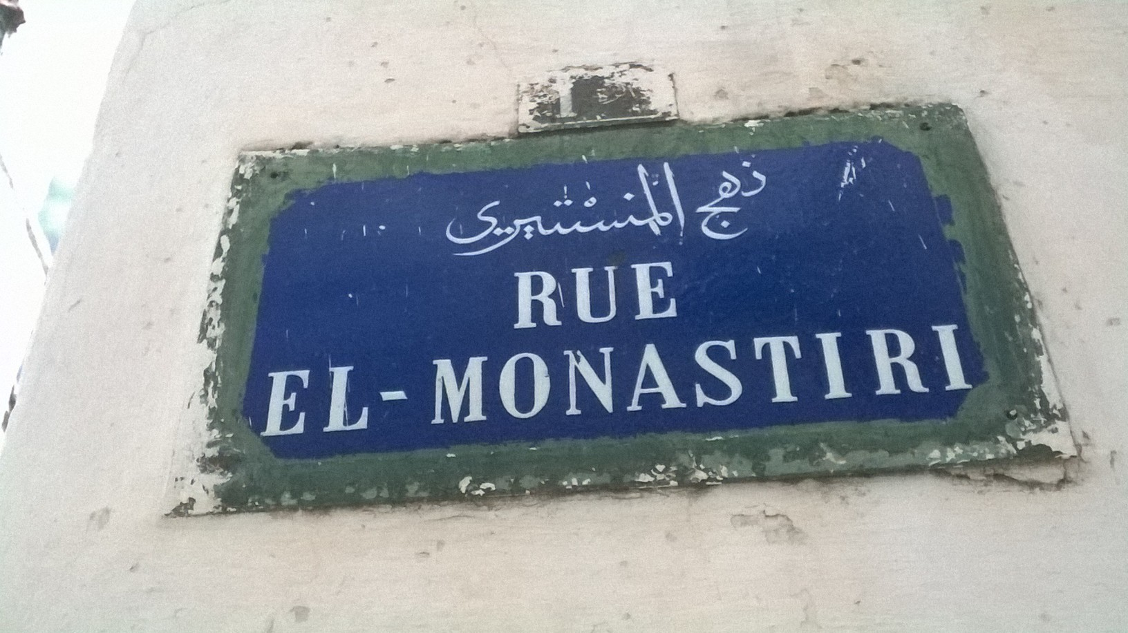 La médina de Tunis مدينة تونس العتيقة